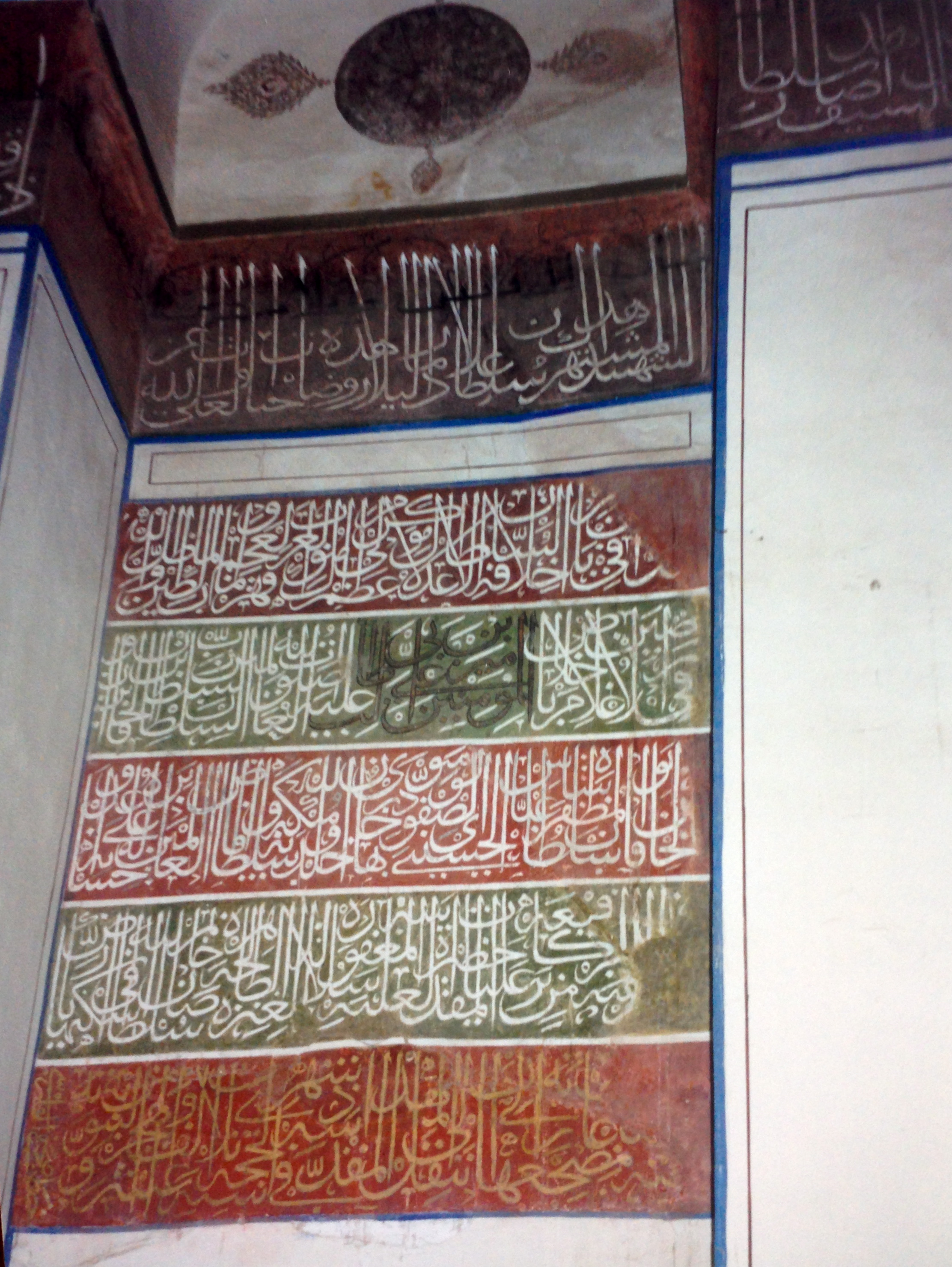 کتیبه داخل بقعه شهشهان